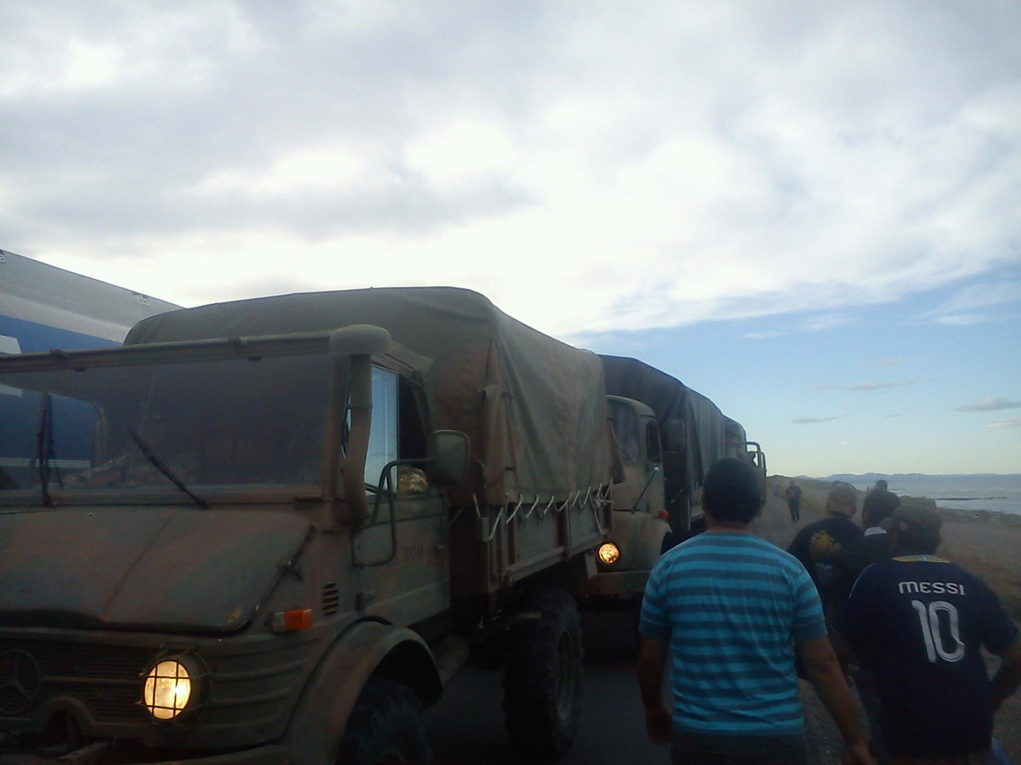 Dias de escasez de agua en Caleta Olivia